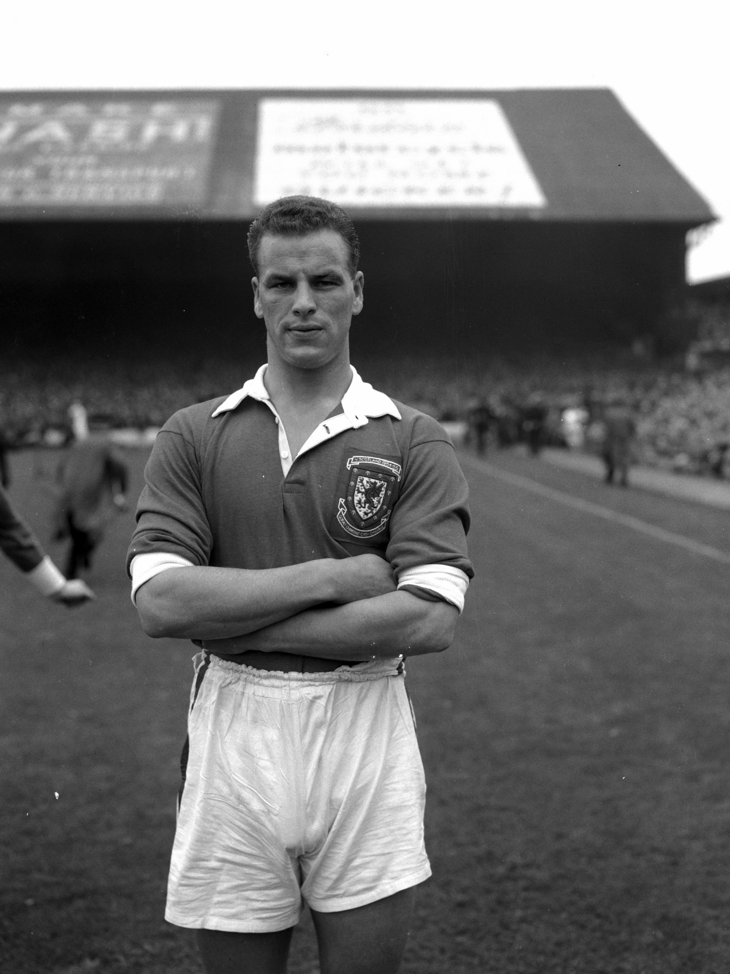 Teitl Cymraeg/Welsh title: John Charles, Cymru yn erbyn Yr Alban, Parc Ninian, 1954 Ffotograffydd/Photographer: Geoff Charles (1909-2002) Dyddiad/Date: October 22, 1954. Cyfrwng/Medium: Negydd ffilm / Film negative Cyfeiriad/Reference: (gch14802) Rhif cofnod / Record no.: 3376462 Rhagor o wybodaeth am gasgliad Geoff Charles yn Llyfrgell Genedlaethol Cymru More information about the Geoff Charles Collection at the National Library of Wales